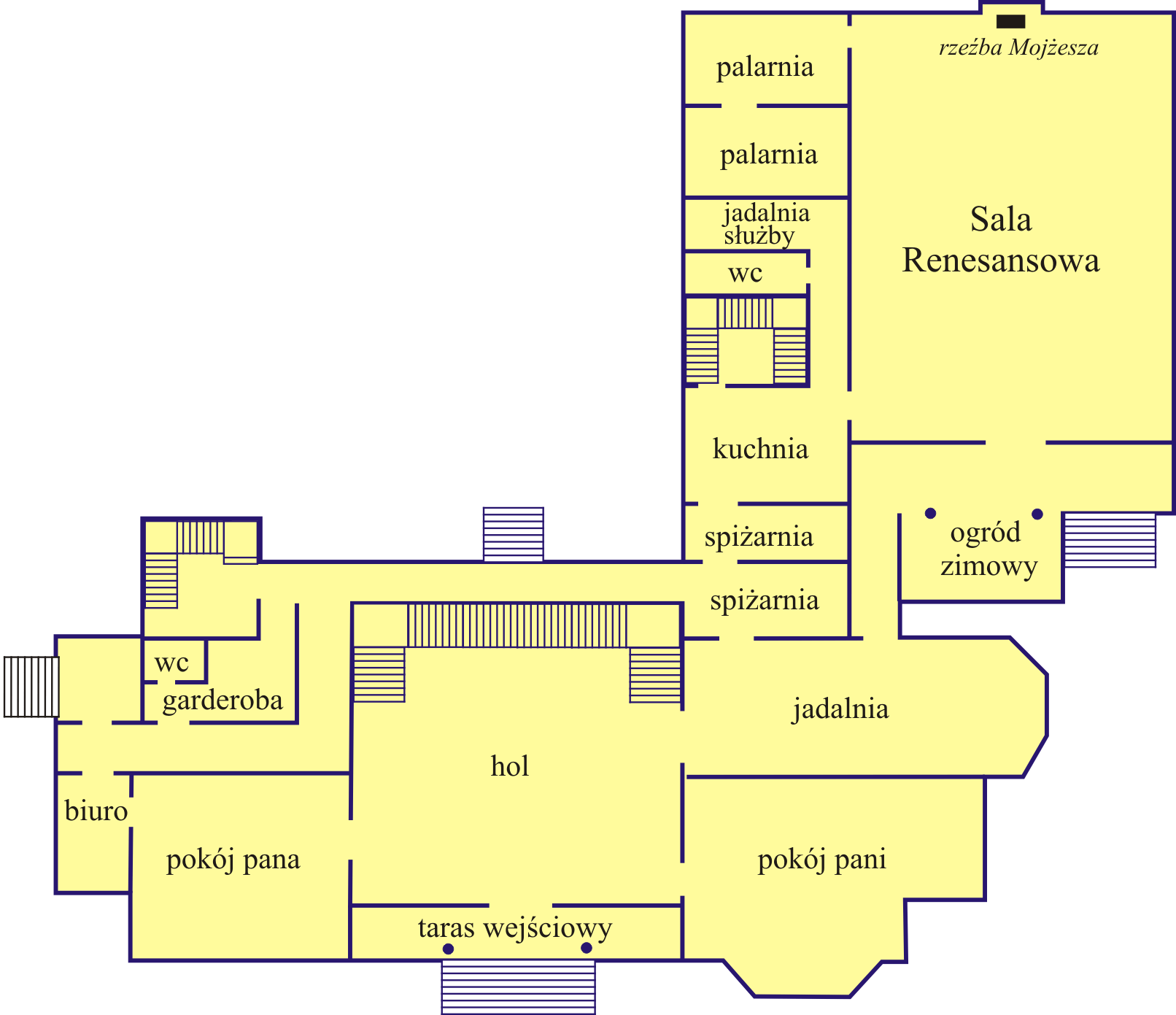 Plan parteru Pałacu Toepffera przy ul. Grabowej w Szczecinie Zdrojach.